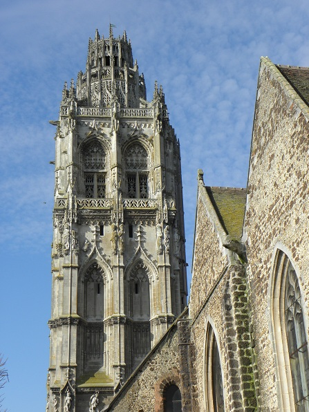 Tour de l'église de la Madeleine à Verneuil-sur-Avre (27).